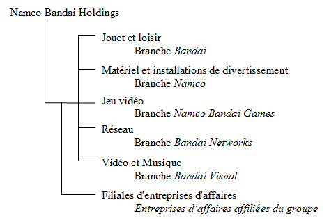 Secteur d'activité de Namco Bandai Holdings